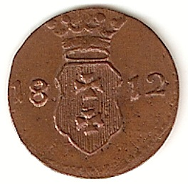 1 shilling of Free City of Gdańsk (Danzig), 1812/szeląg Wolnego Miasta Gdańska, 1812